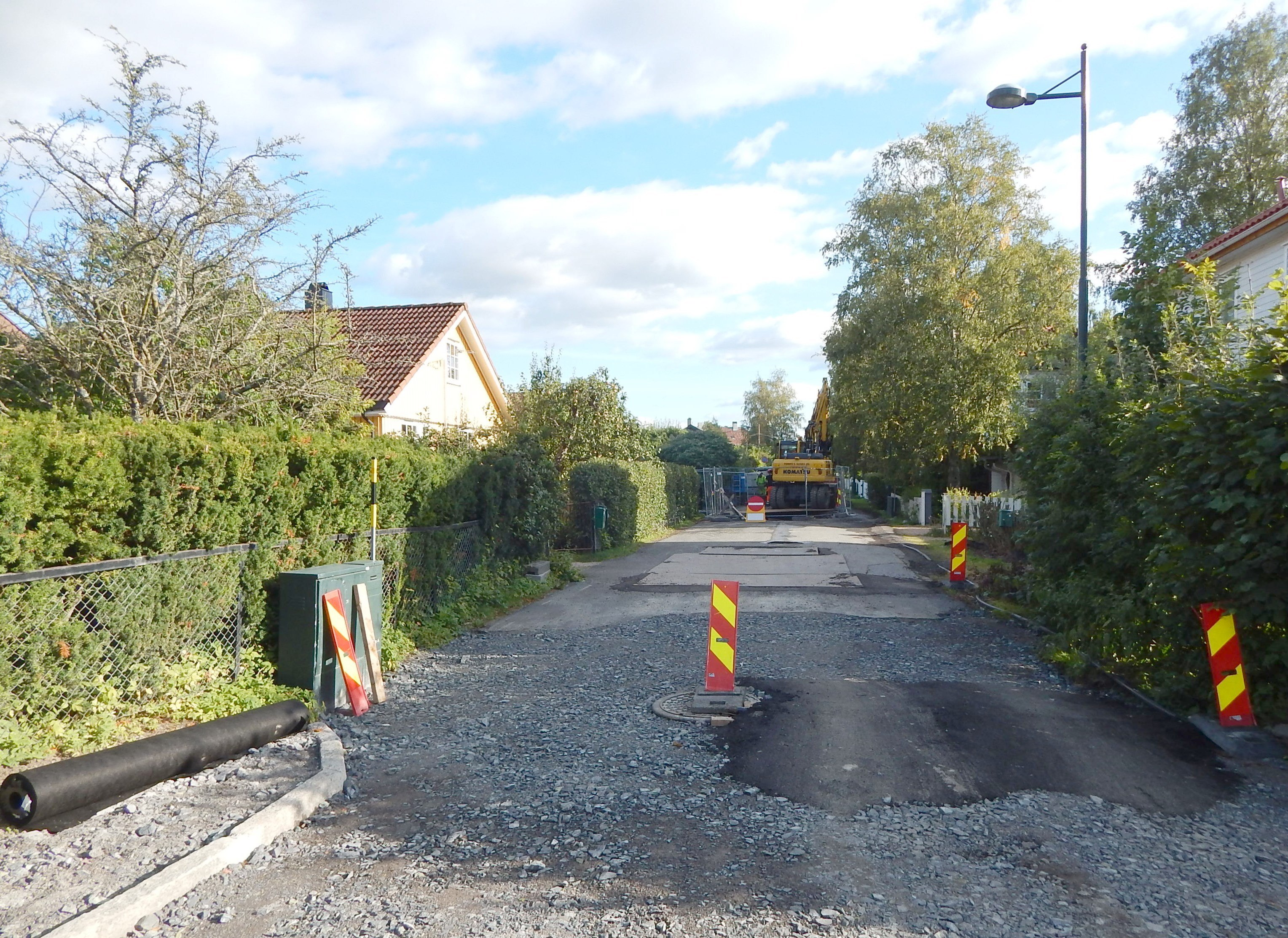 Arbeid i Veslefrikkveien i 2015